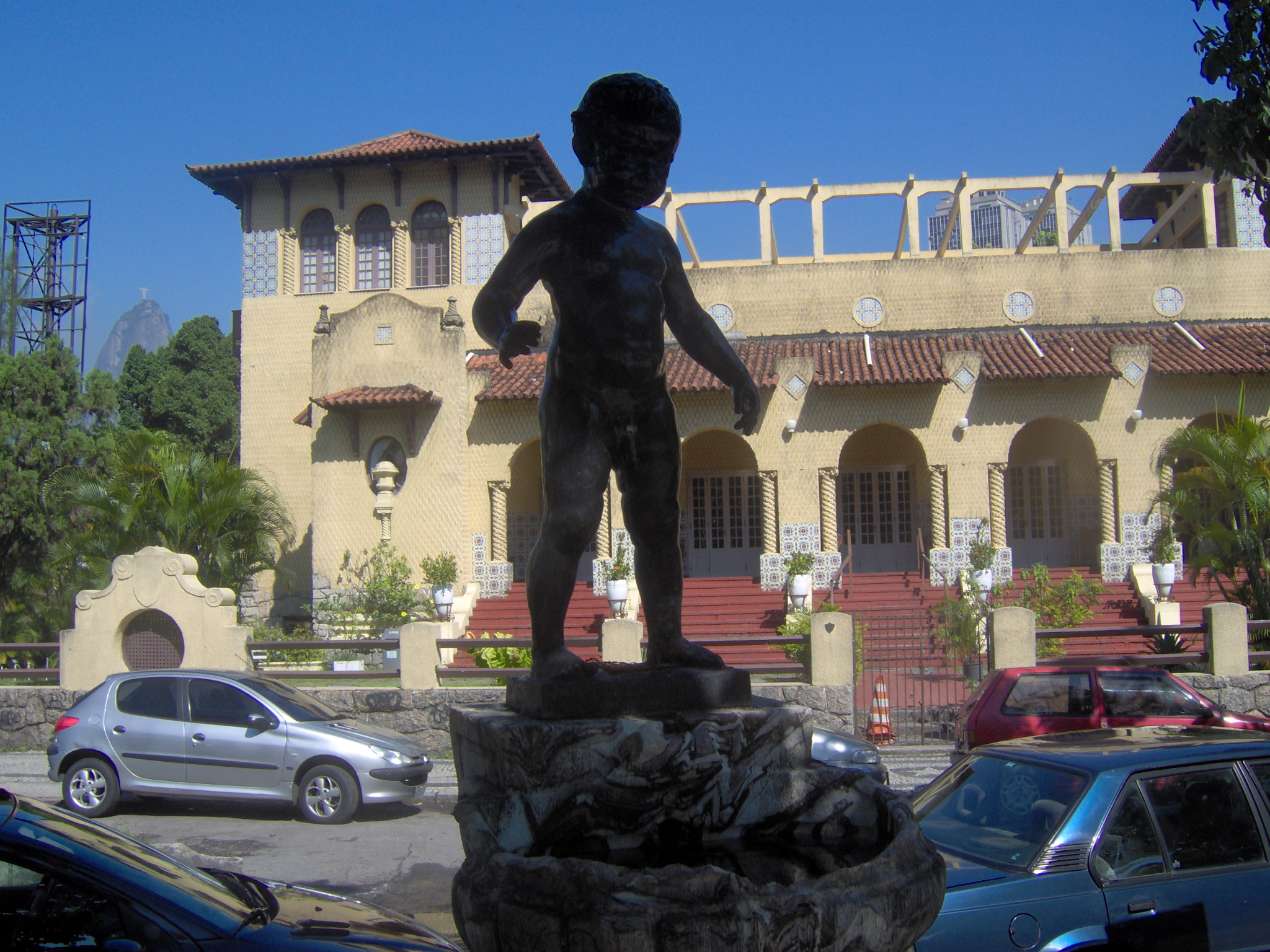 Estátua do Manequinho em frente à sede de General Severiano do Botafogo de Futebol e Regatas, no Rio de Janeiro, Brasil.